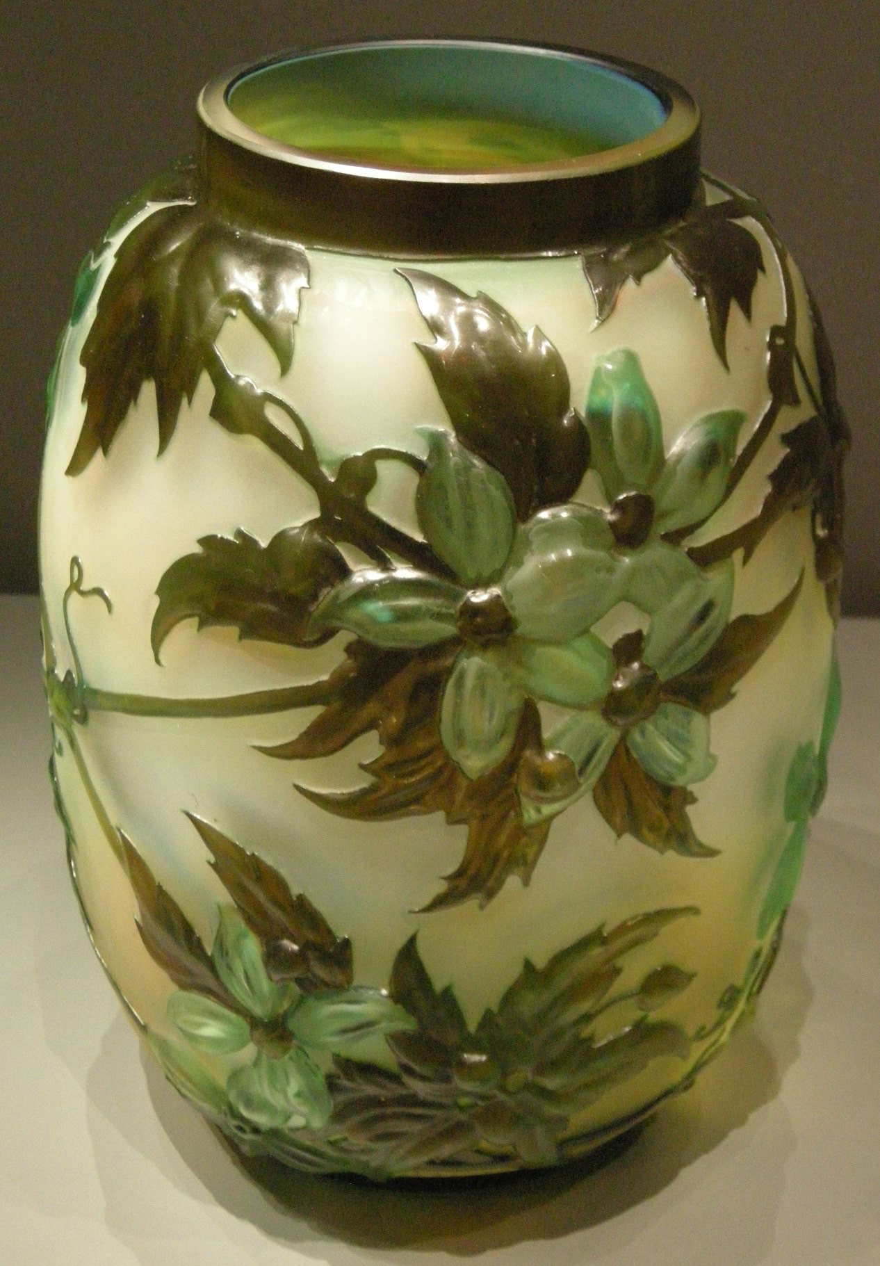 Gallé, nancy, vaso clematis, 1890-1900